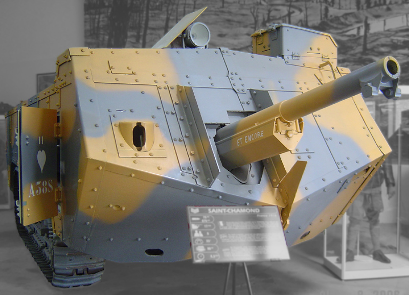 Saint-Chaumond on display at the Musée des Blindés in Saumur. The picture taken August 8, 2006.